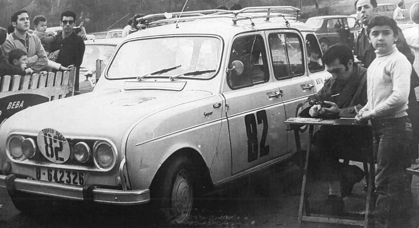 Martí Tantiñá i Través amb el Renault 4 a l’edició de 1968.